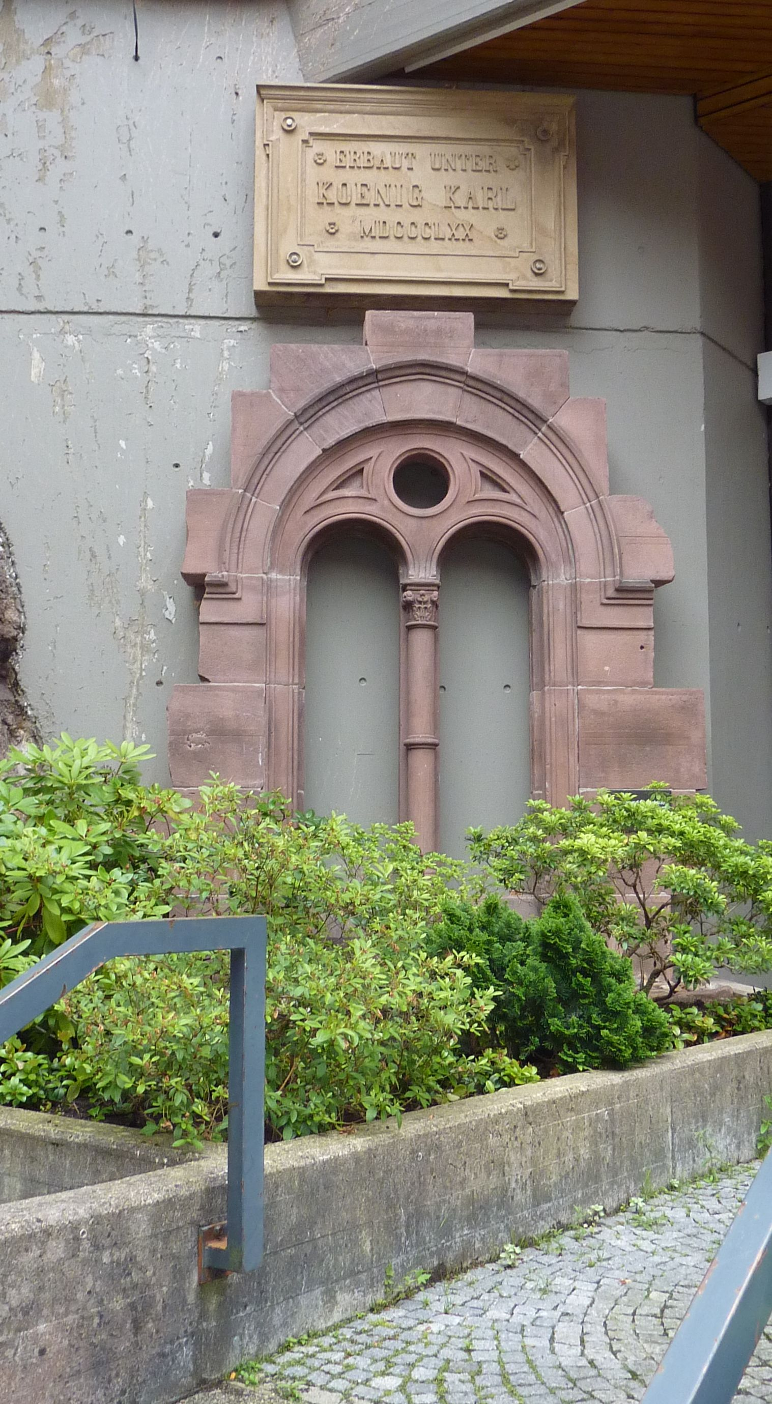 Überrest des Katharinenstifts in Bad Wildbad